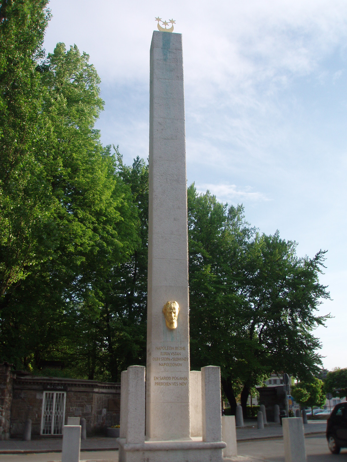 Napoleonov spomenik